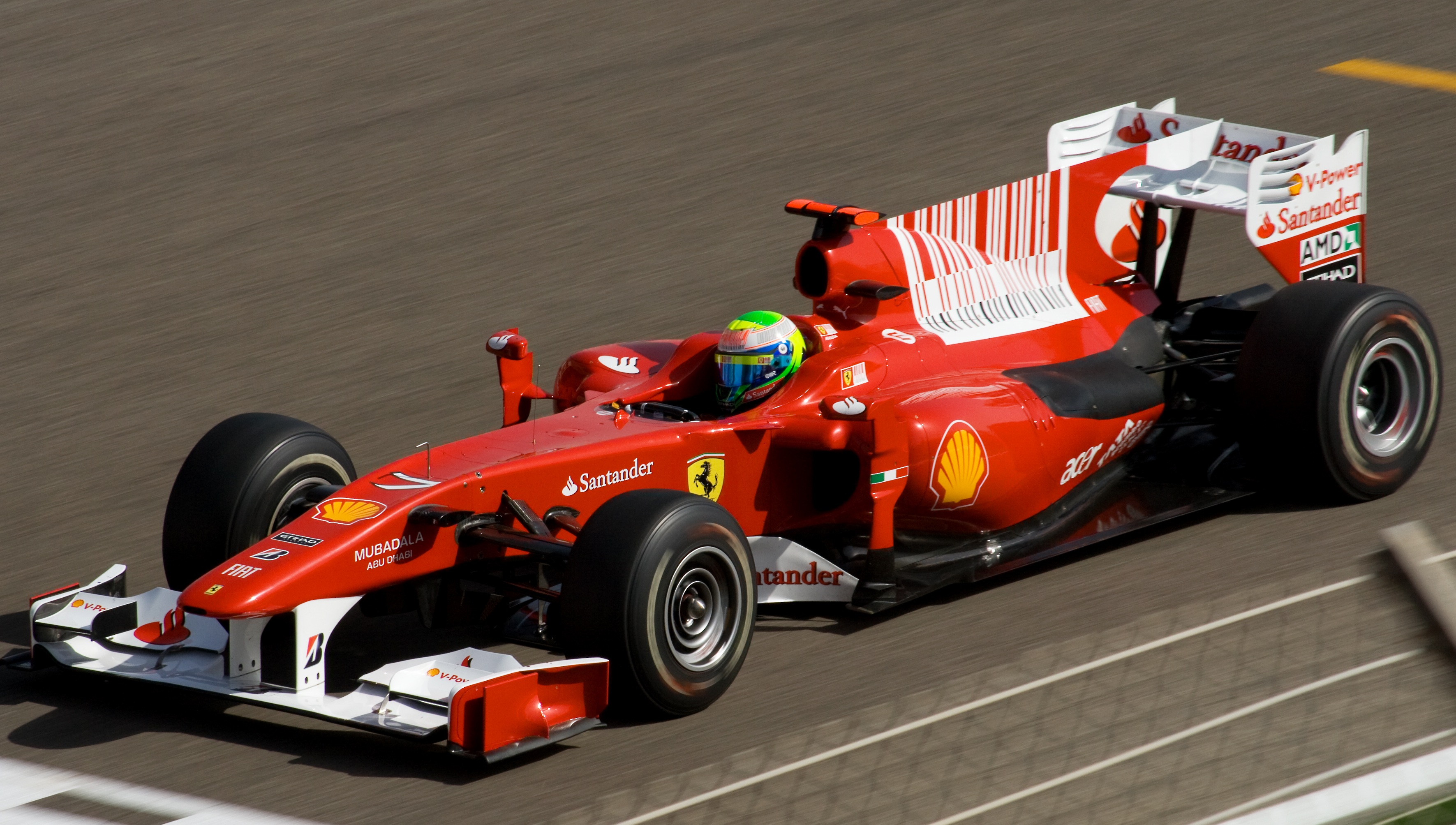 Felipe Massa Ferrari single-seater during Bahrain 2010 GP